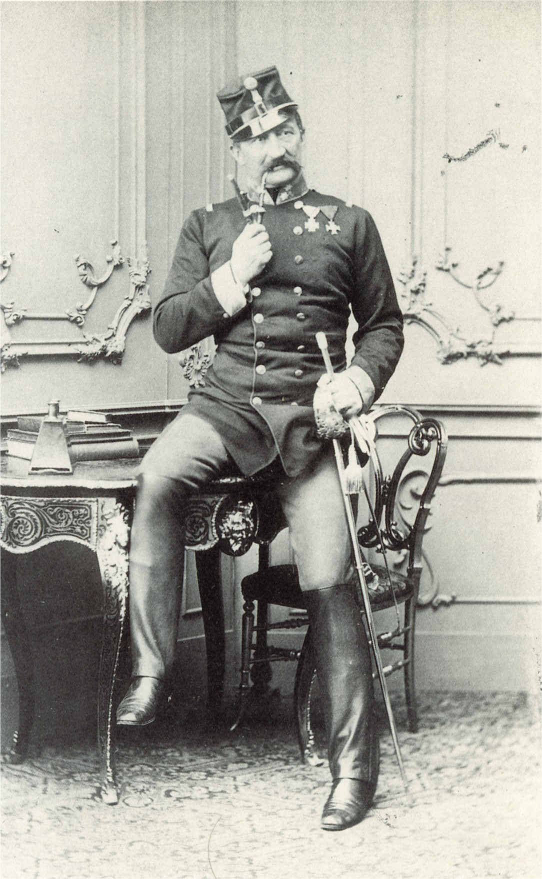 Karl Ludwig Graf von Grünne, Feldmarschall-Leutnant in der österreichischen Armee